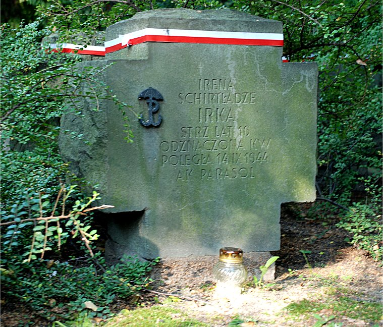 Grób Ireny Schirtładze na Powązkach wojskowych w Warszawie